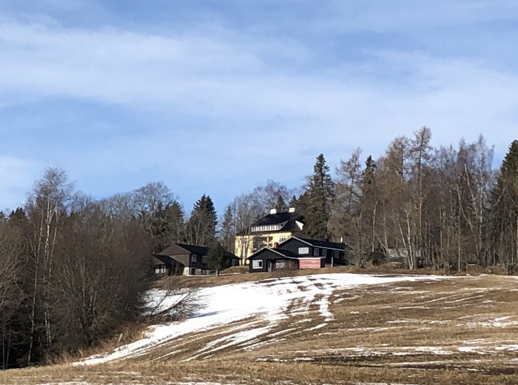 Skøienvegen 66-68, Lunner